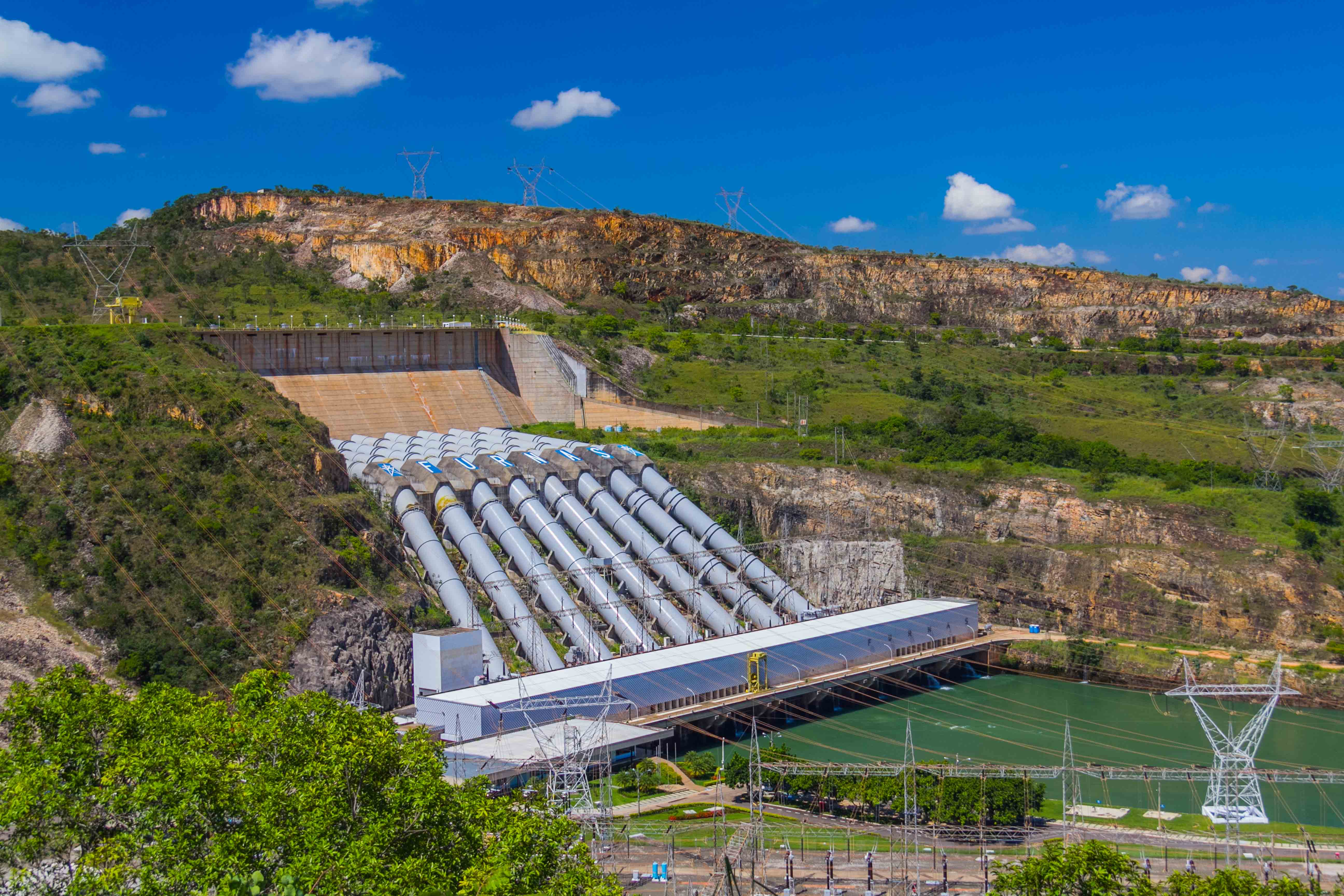 Turbinas da usina de Furnas